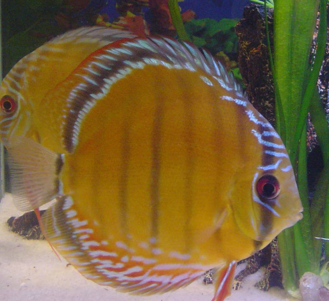 S. Aequifasciata Axelrodi